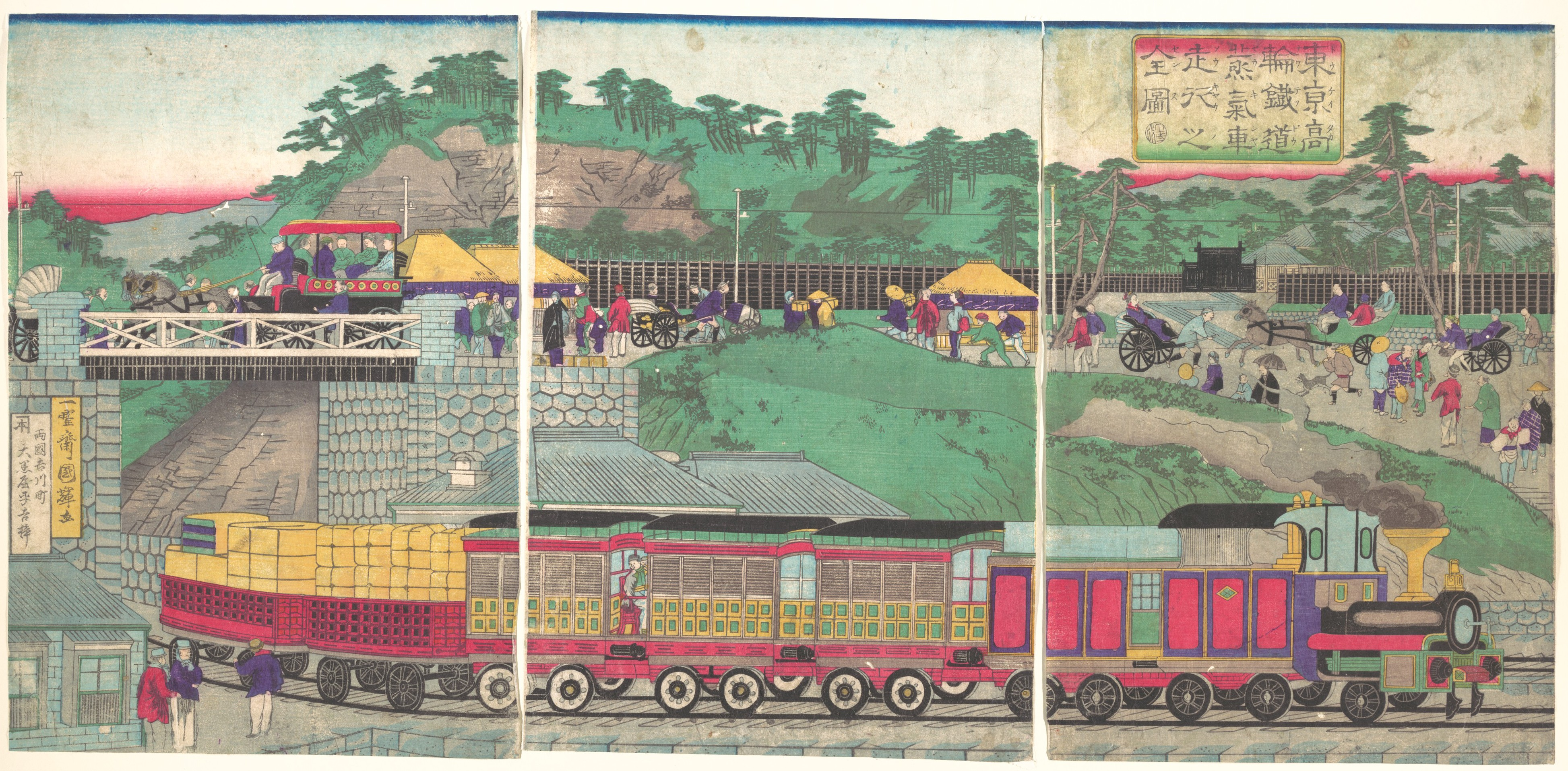 Japan; Print; Prints